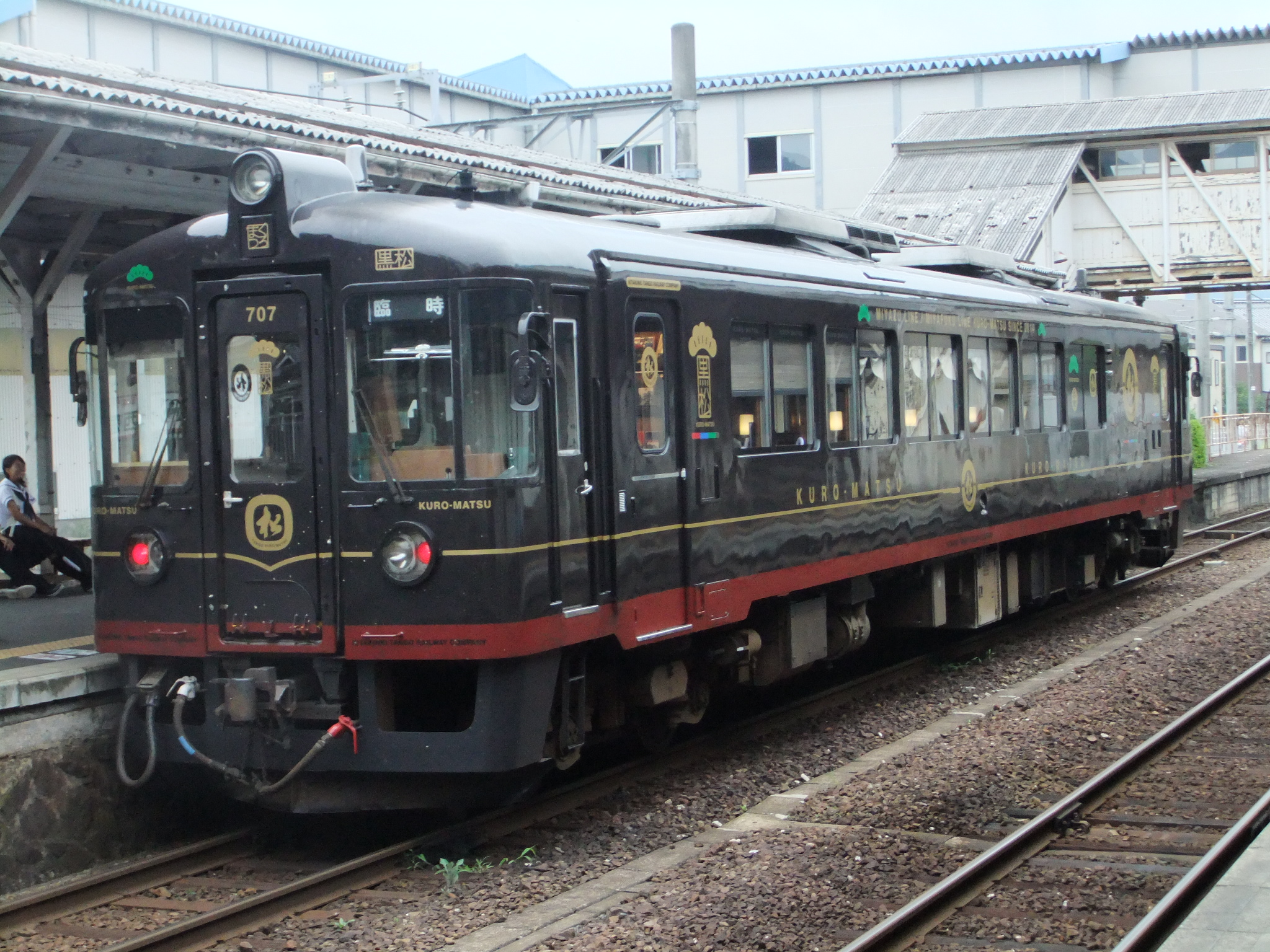 京都丹後鉄道 707号 くろまつ